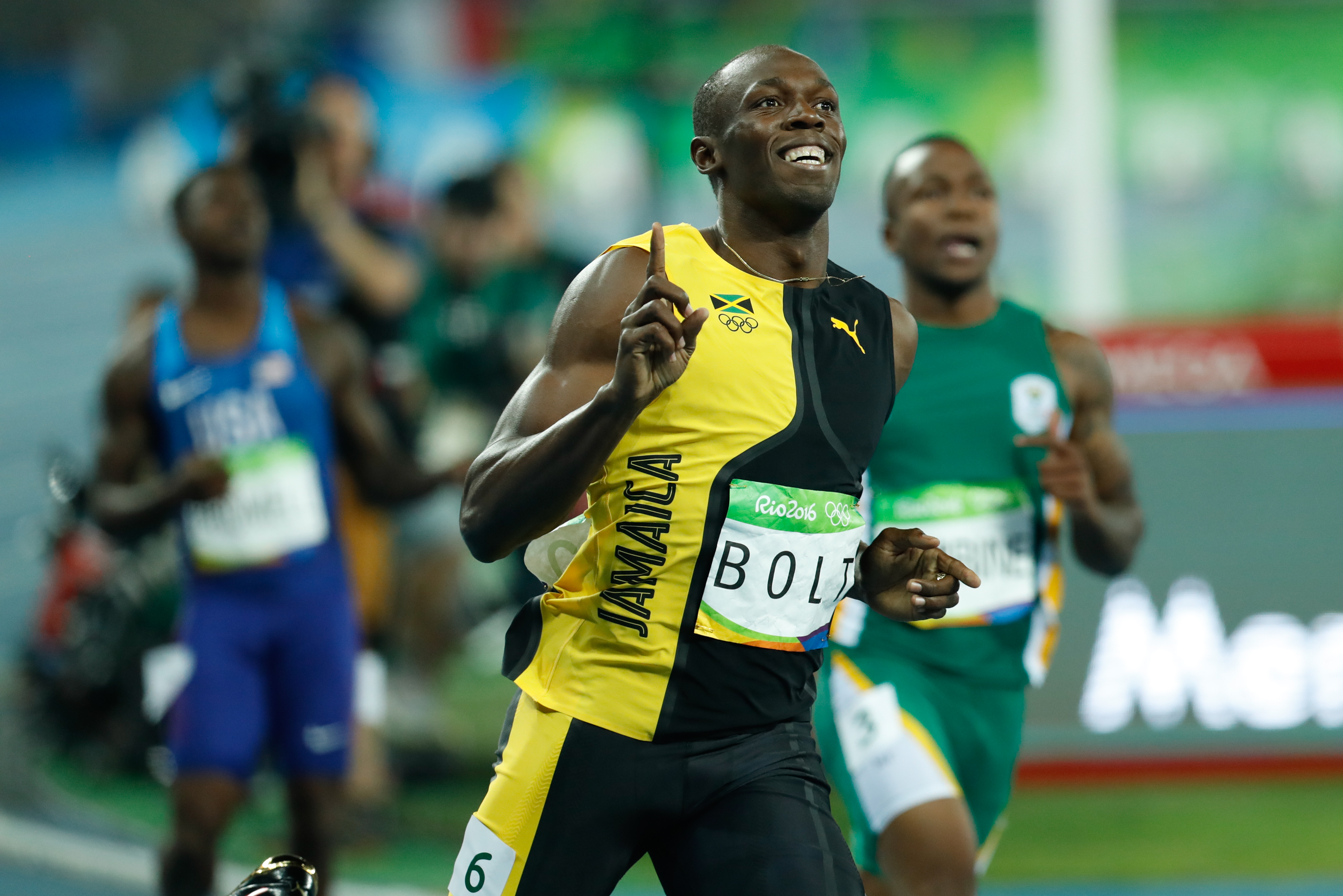 Rio de Janeiro - O jamaicano Usain Bolt, garantiu o ouro e fez história ao conquistar pela terceira vez o título de homem mais rápido do mundo nos 100 metros rasos em uma Olimpíada (Fernando Frazão/Agência Brasil).